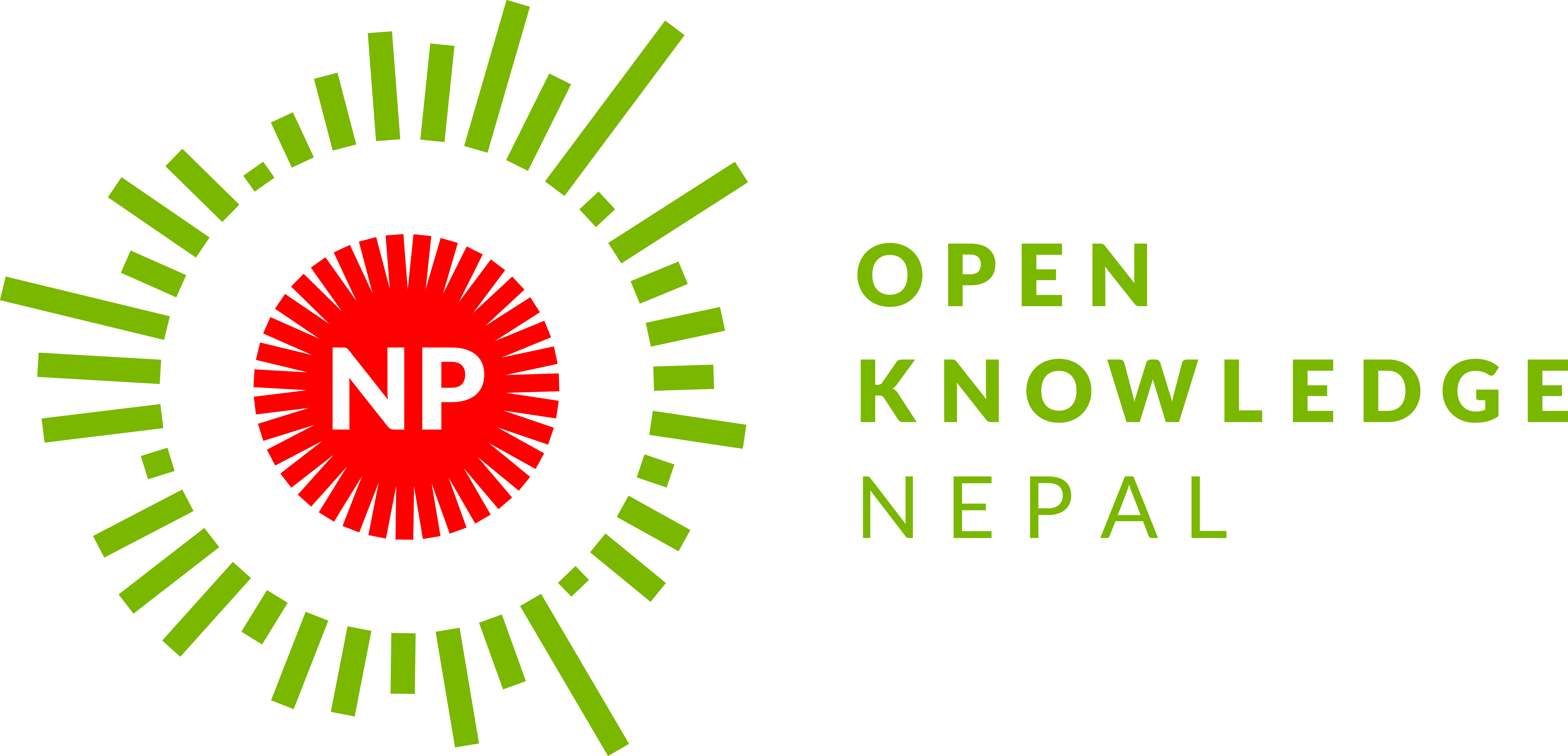 नेपाली: खुल्ला ज्ञान नेपालको logo